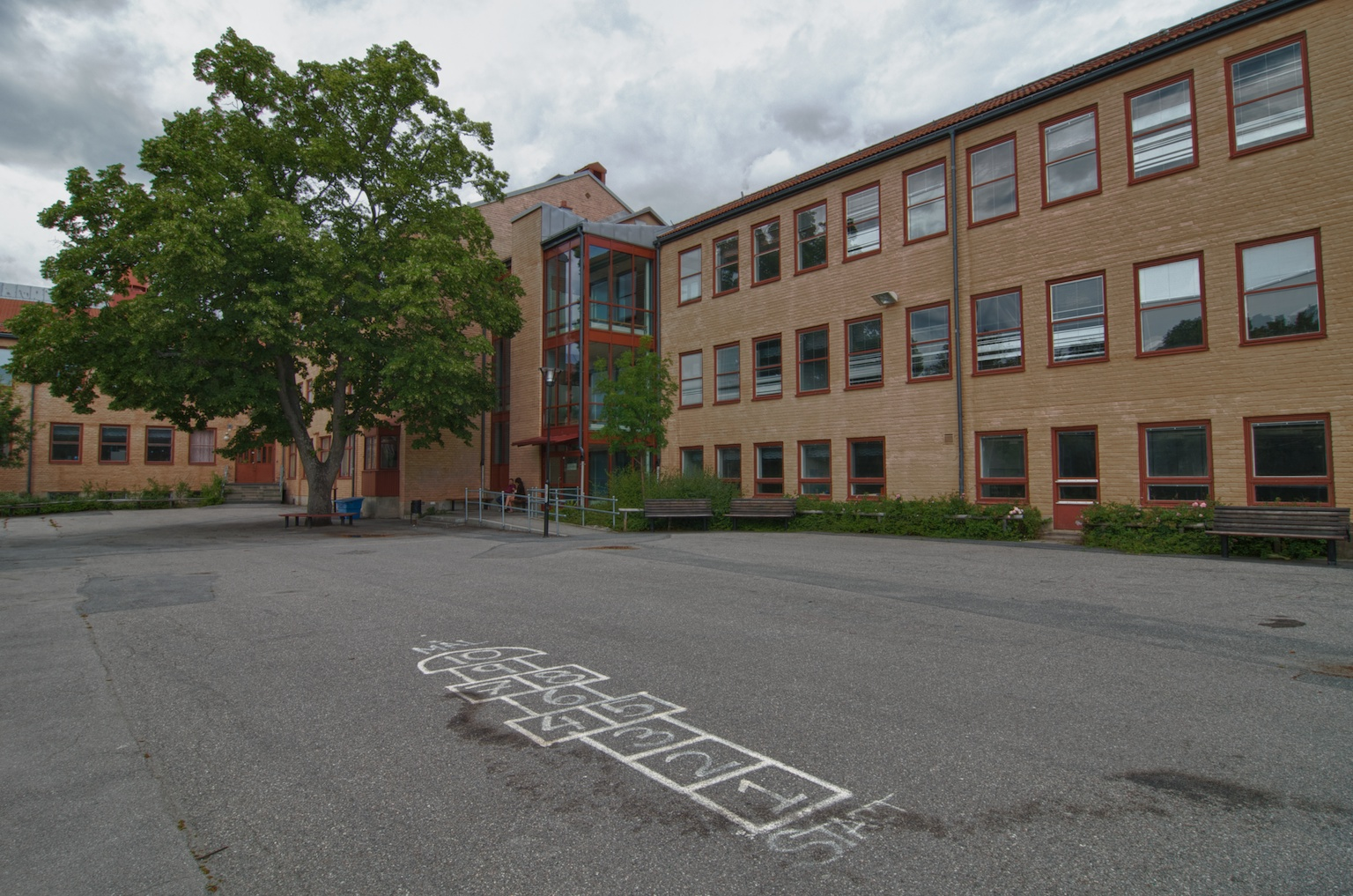 Spånga gymnasium, Adolf Rudbecks väg 21, Spånga